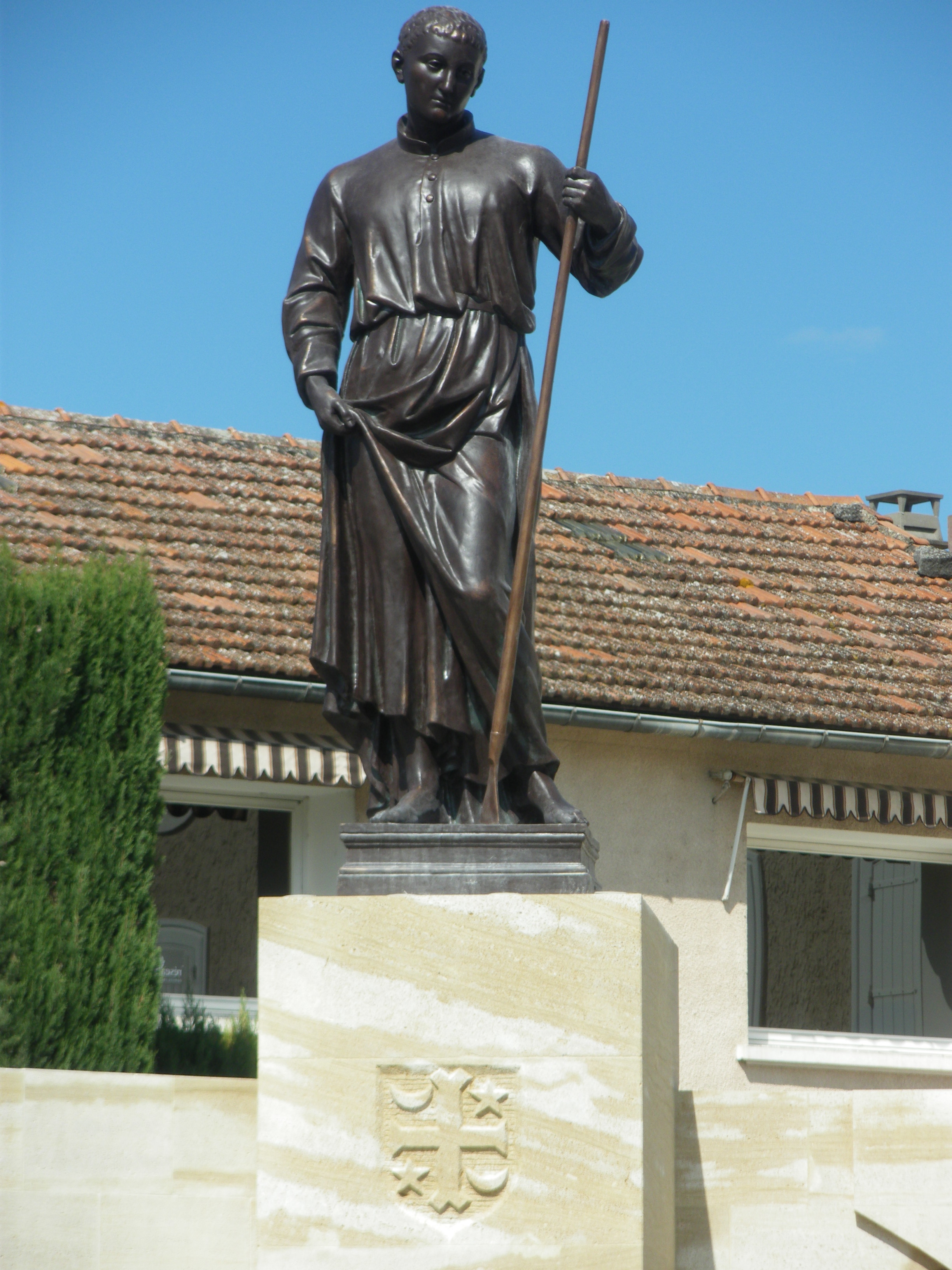 Statue Saint Gens, Monteux, Vaucluse, France